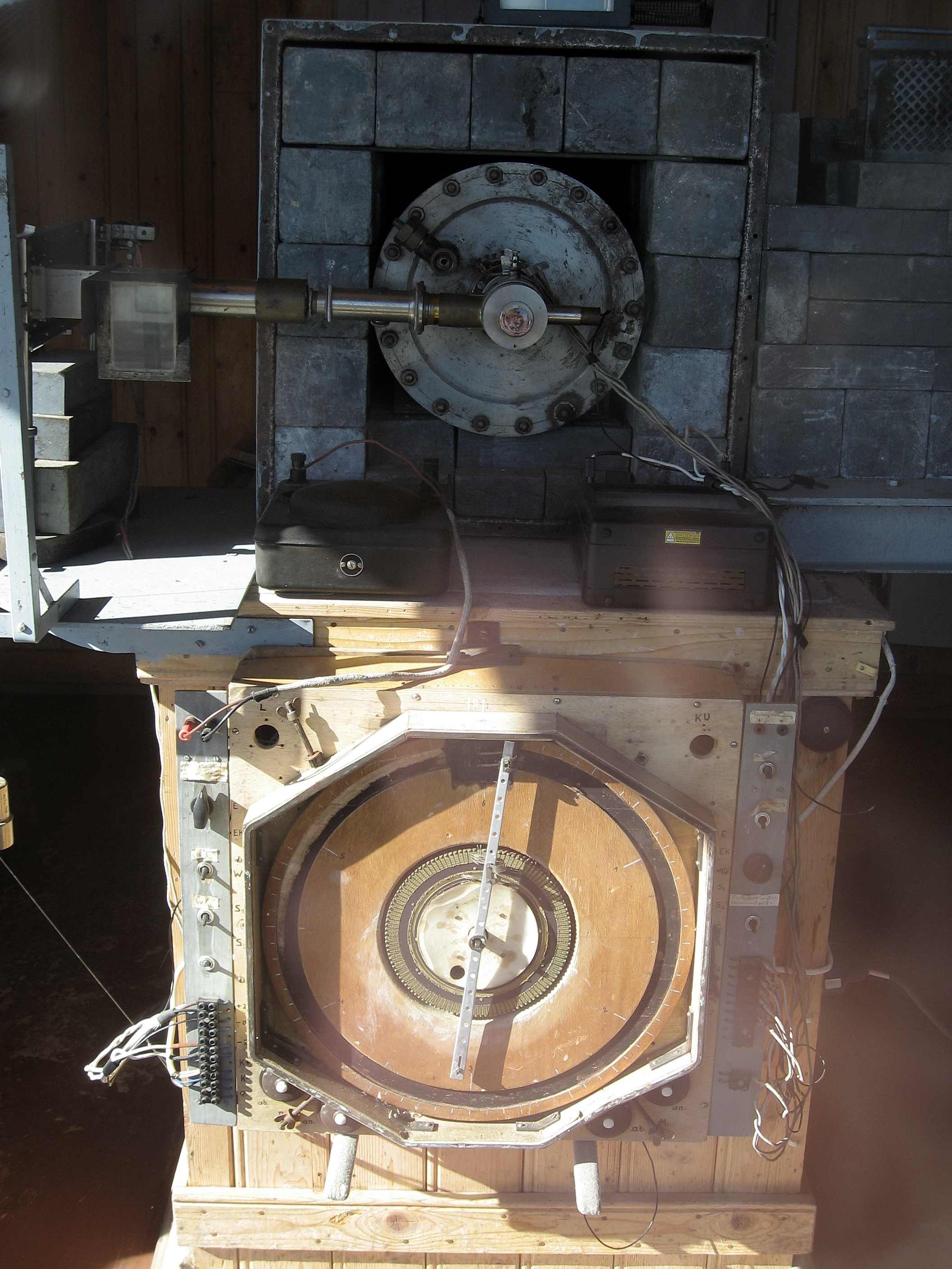 Österreich, Innsbruck, Hafelekar, Seit 1931 befindet sich auf Initiative des österreichischen Nobelpreisträgers Victor Franz Hess hin eine Messstation zur Beobachtung der kosmischen Strahlung. Heute ist dort eine Messstelle der Medizinischen Universität Innsbruck für die Intensität der ultravioletten Strahlung untergebracht.